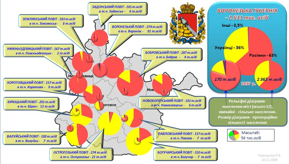 Население Воронежской губернии согласно переписи 1897 г